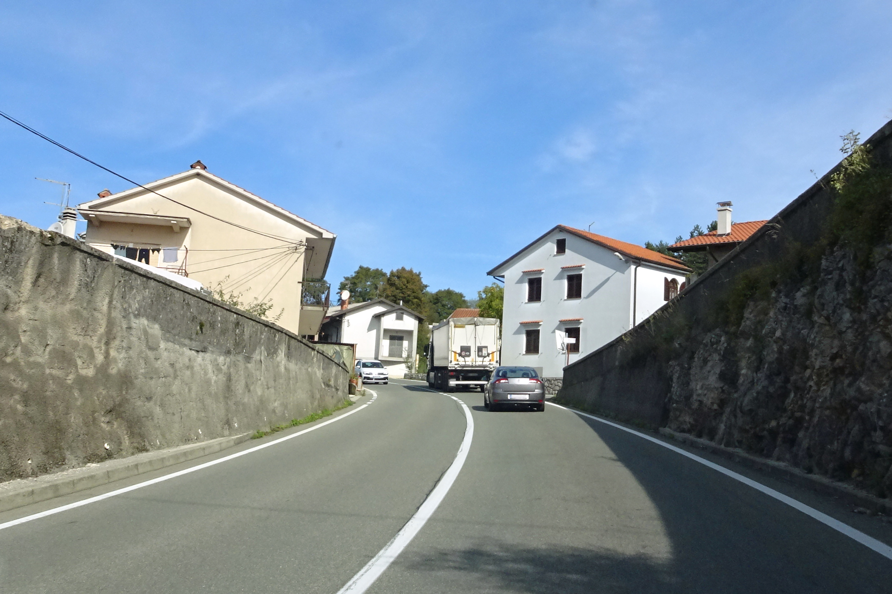 Pasjak, Matulji municipality, Croatia